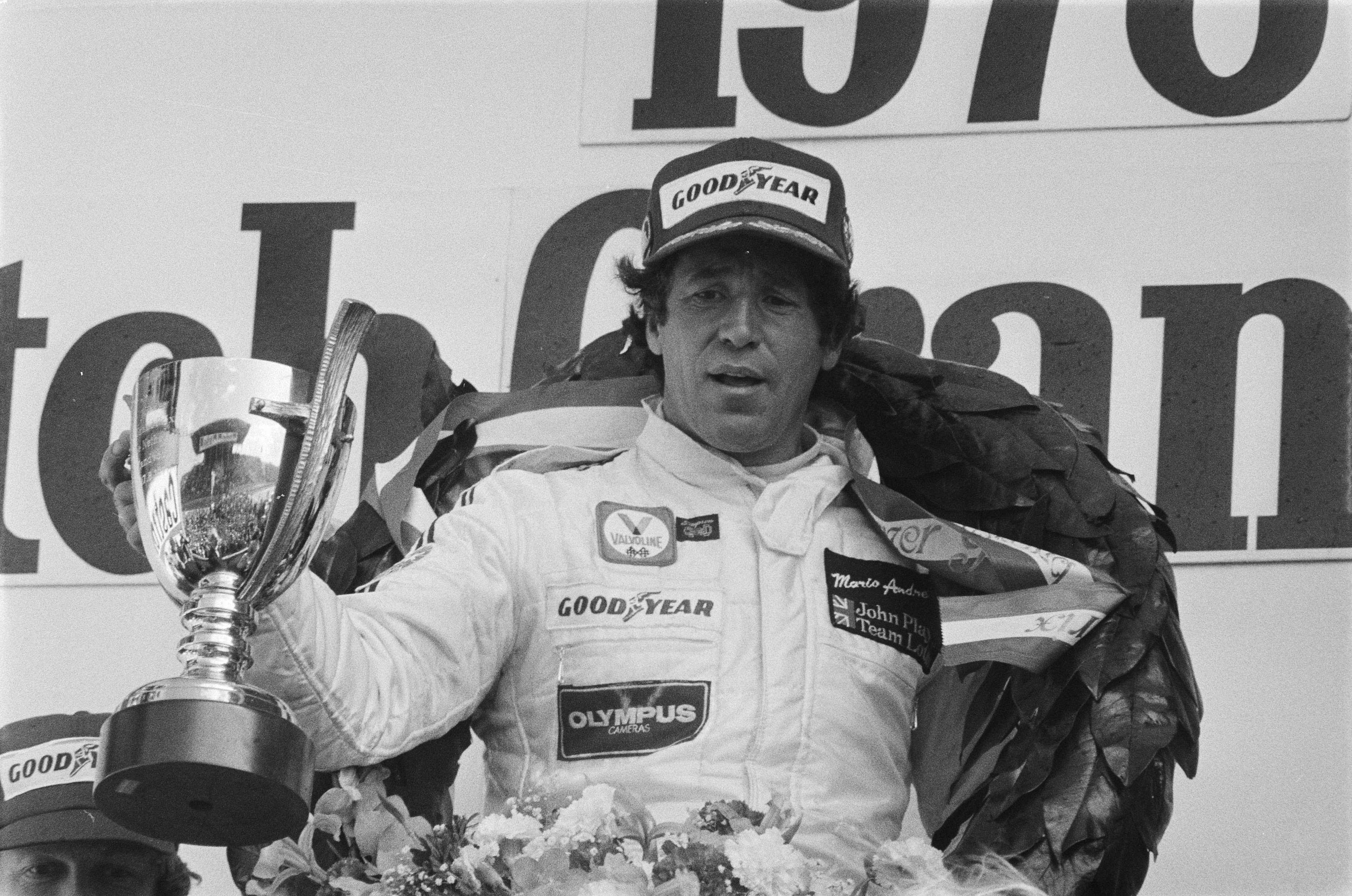 Grand Prix Zandvoort; tijdens huldiging Andretti.